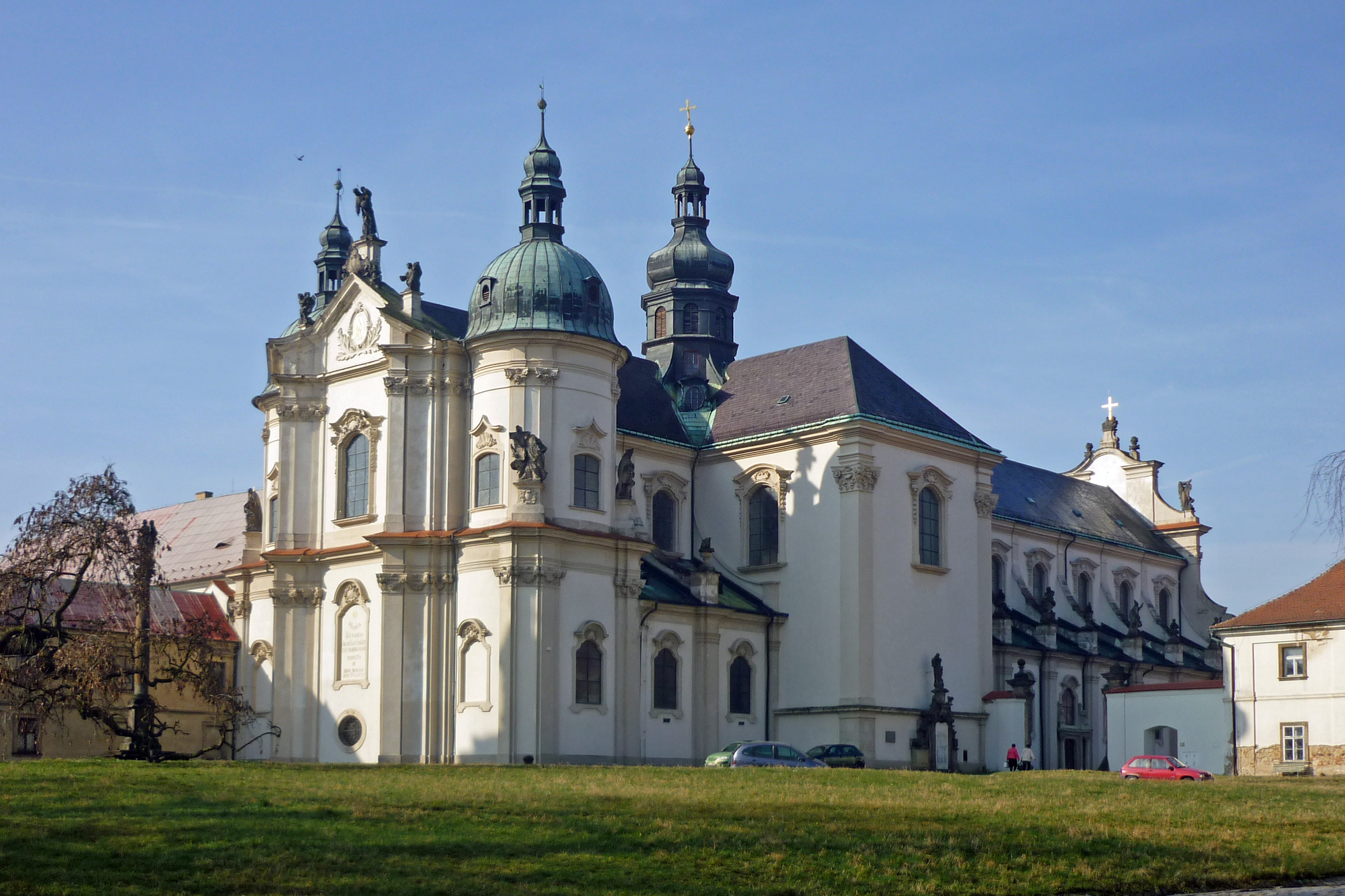 Klosterkirche Mariä Himmelfahrt in der ehem. Zisterzienserabtei in Ossegg (Osek)